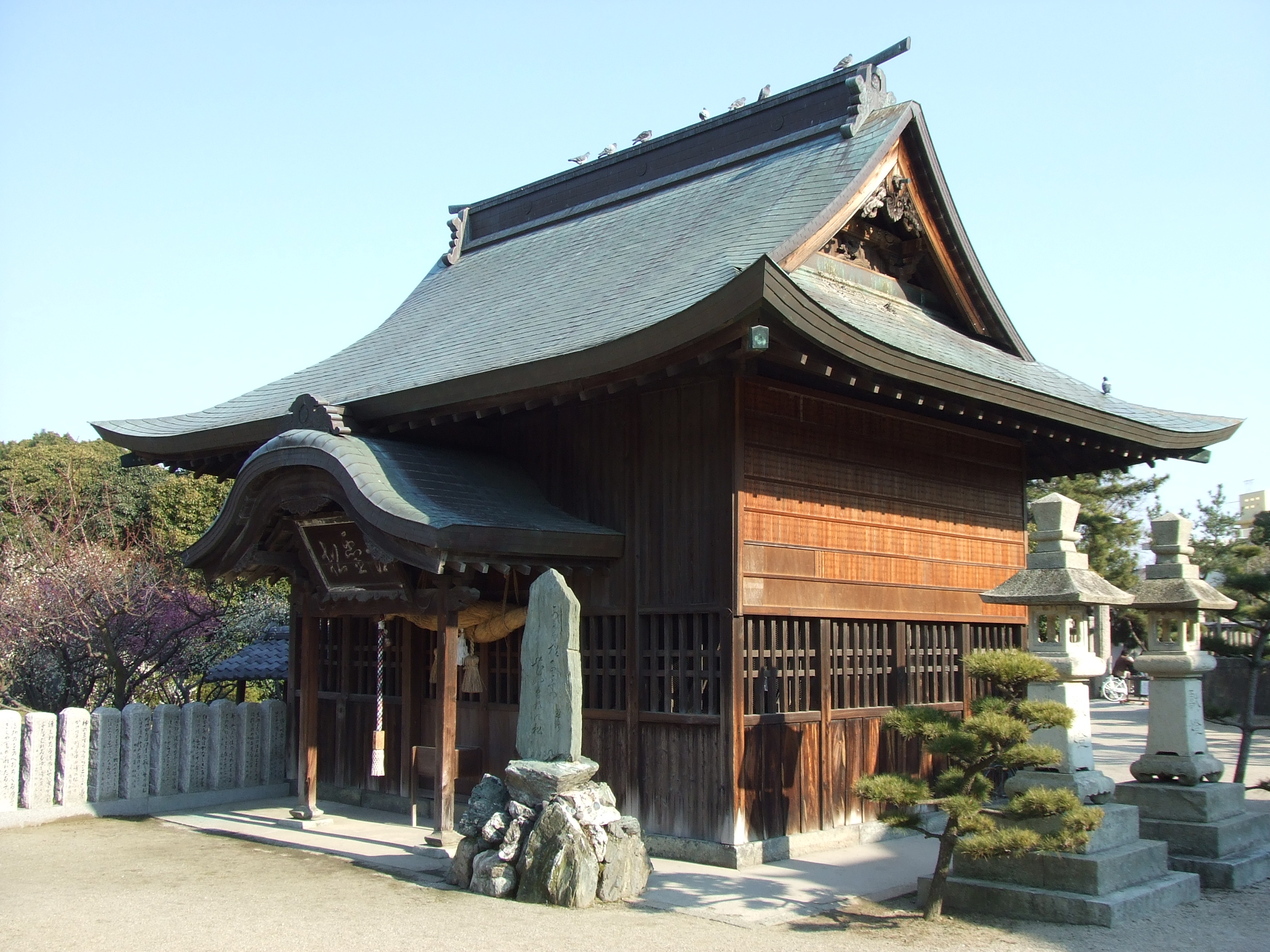 Sone-tenmangu(曽根天満宮)